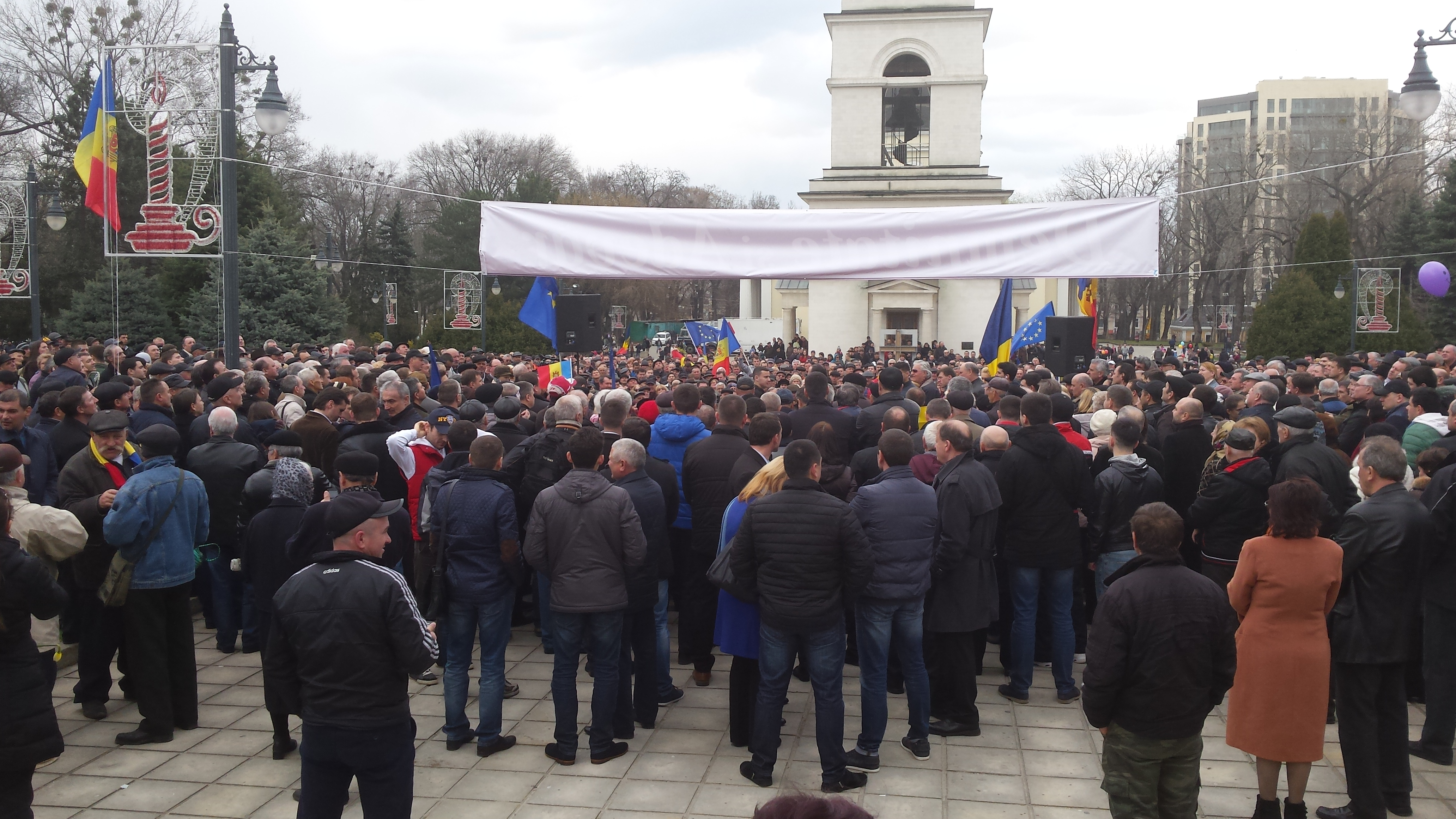 Protestul Platformei Civice Demnitate şi Adevăr (5 aprilie 2015) în Chișinău, R. Moldova